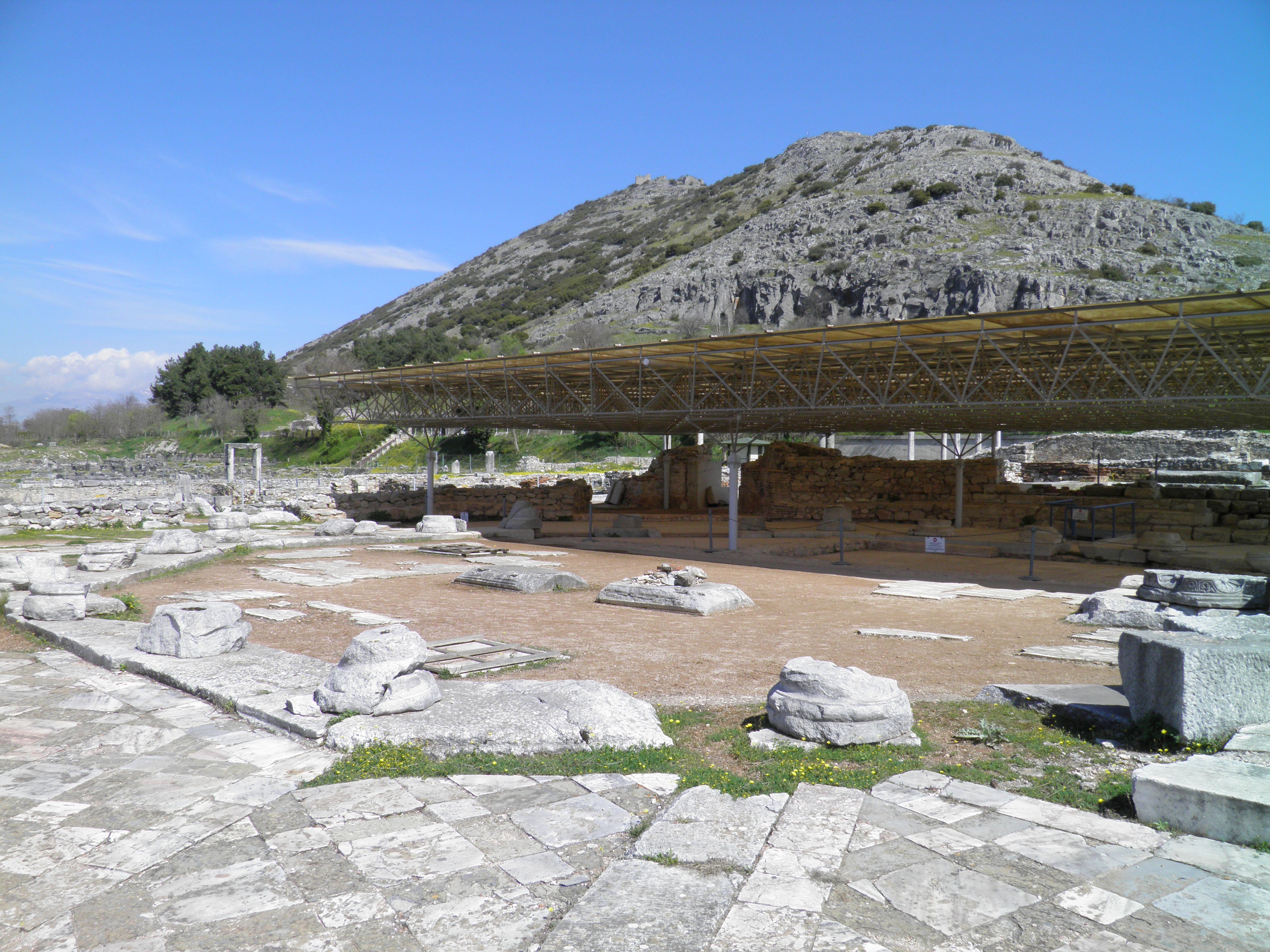 The octagonal Basilica, Philippi